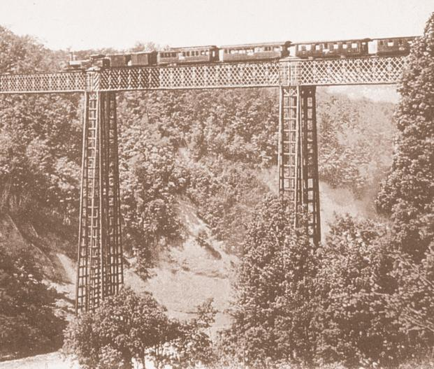 Sitterbrücke bei St. Gallen. Die Brücken über die Sitter, Glatt, Uze und Thur wurden nach den gleichen Konstruktionsprinzipien errichtet.